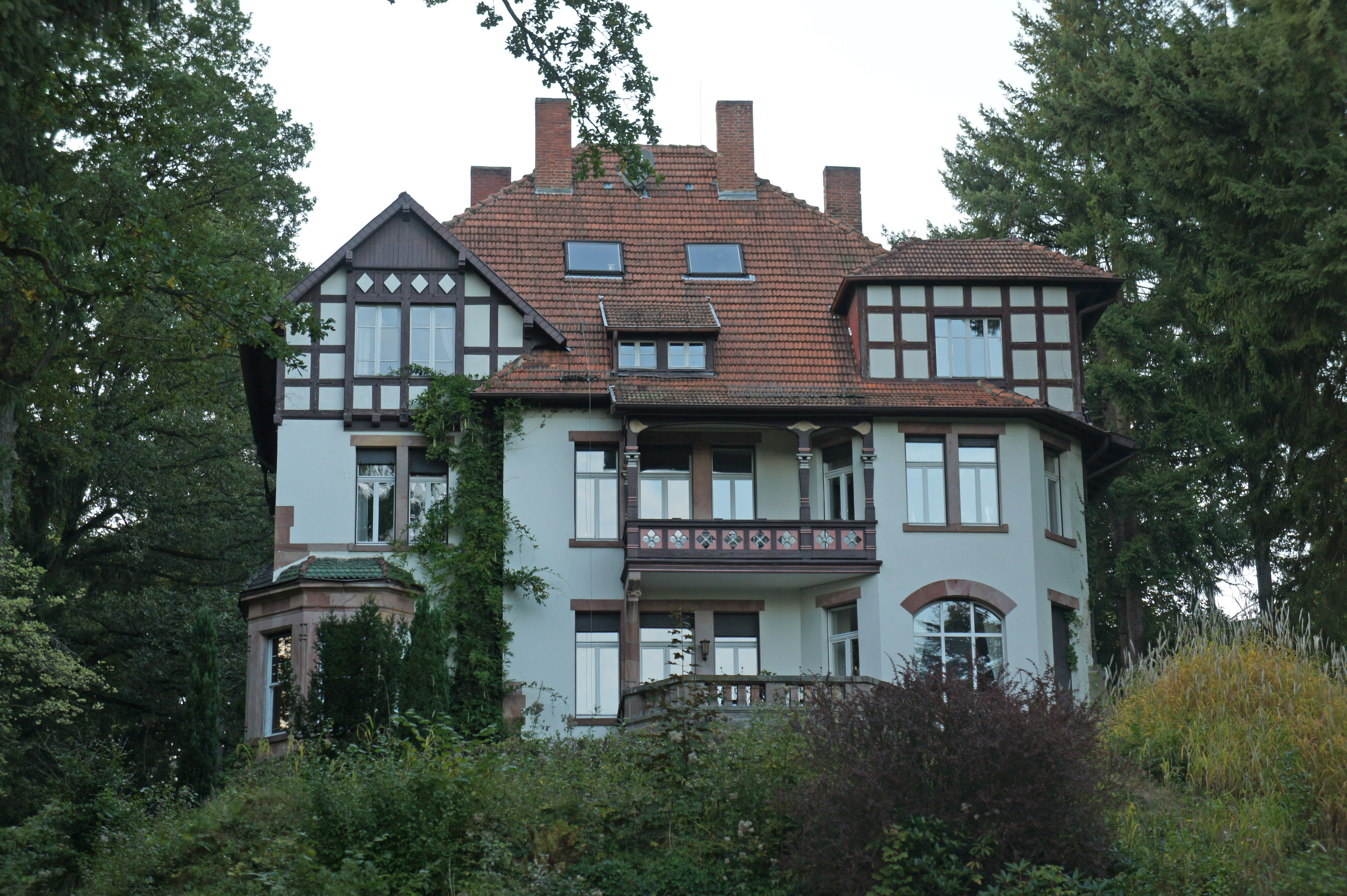 Gut Junkerwald Niederwürzbach, eine Villa die Anfang des 20. Jahrhunderts der in St.Ingbert lebende Armen- und Hospitalarzt Carl Ehrhardt für seine Tochter erbauen ließ.